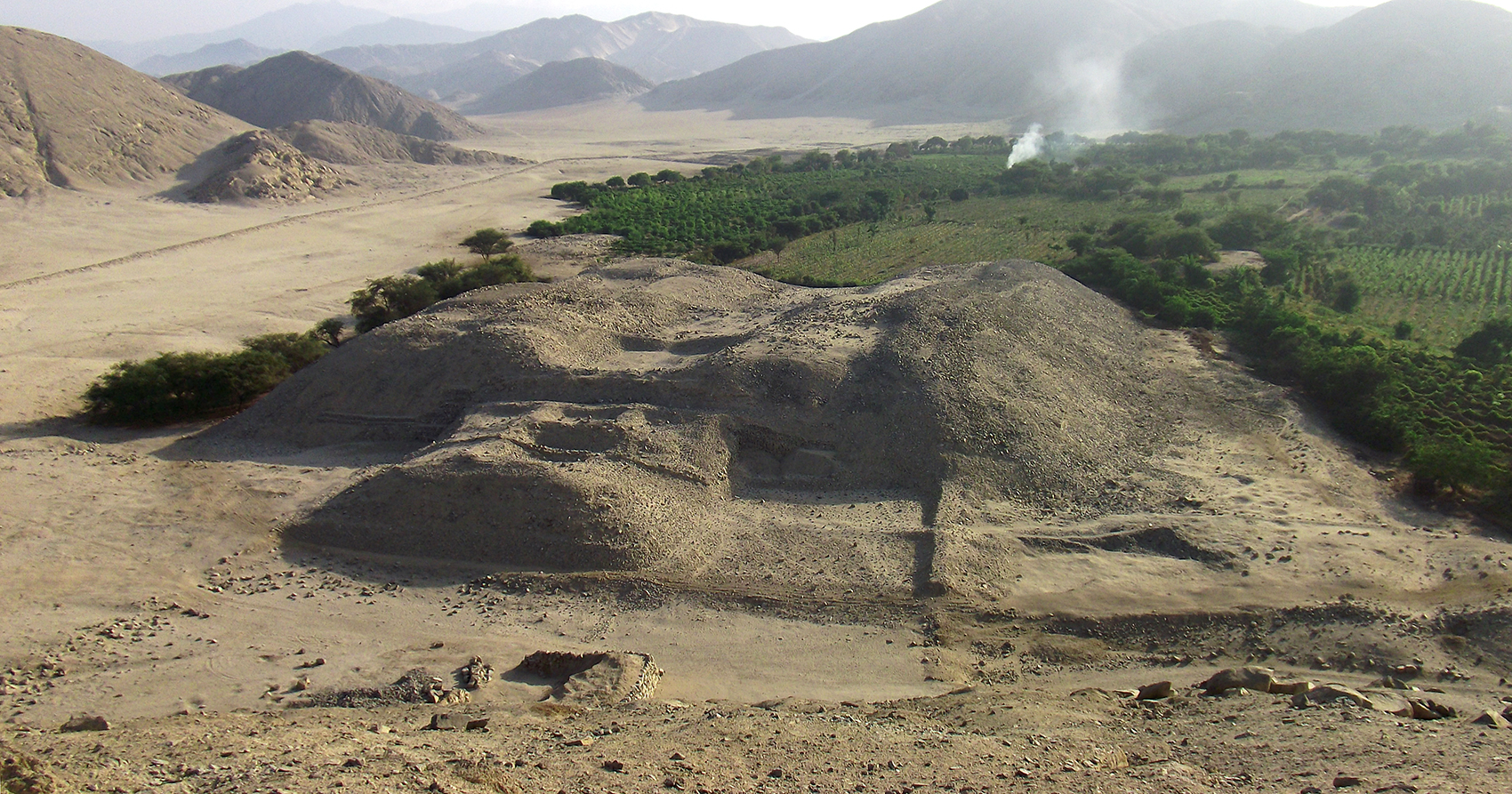 Sechín Bajo